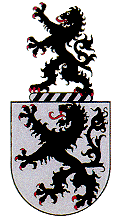 Escudo de Brasão da família Bettencourt, Portugal